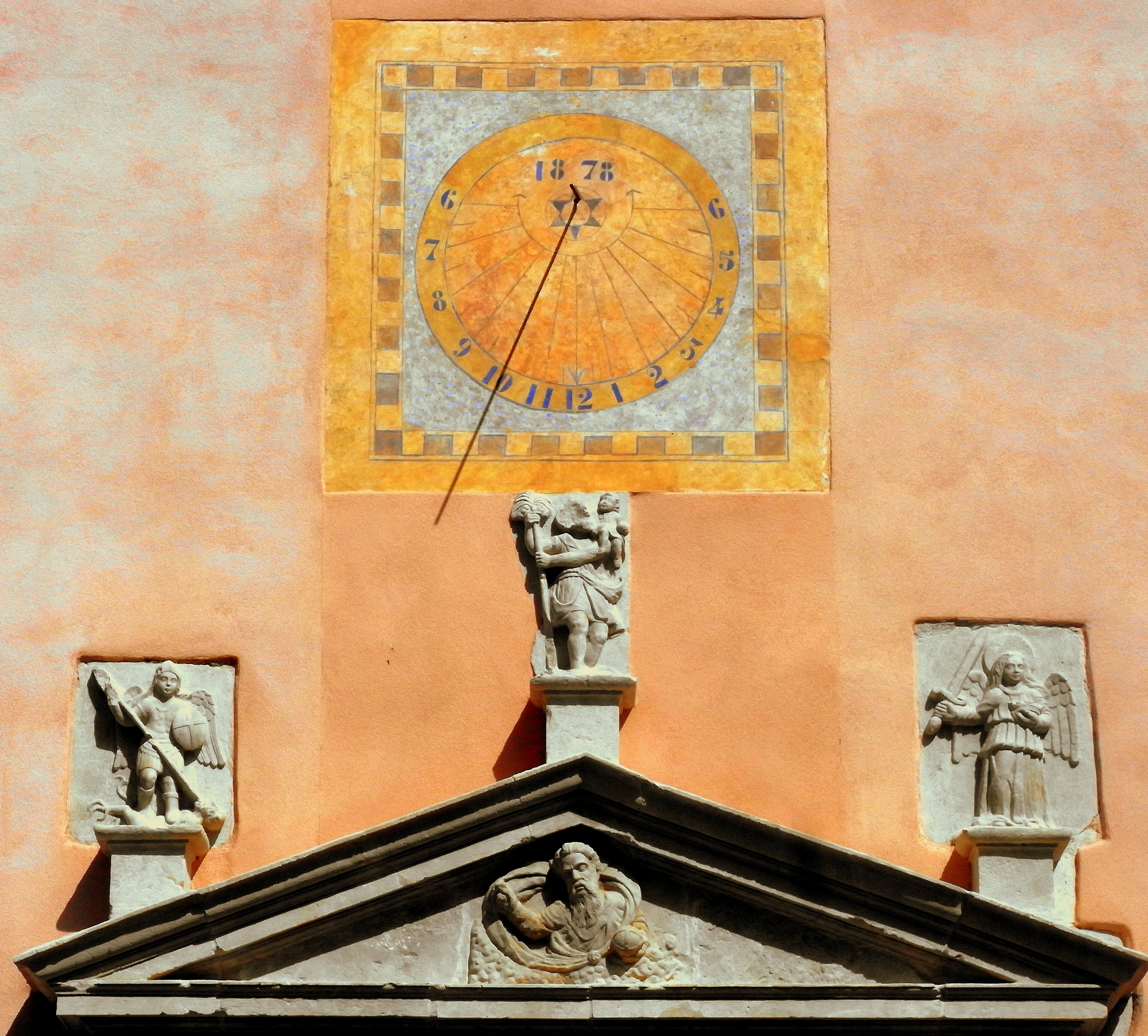 BEGUES - Rellotge de sol a "La Rectoria"